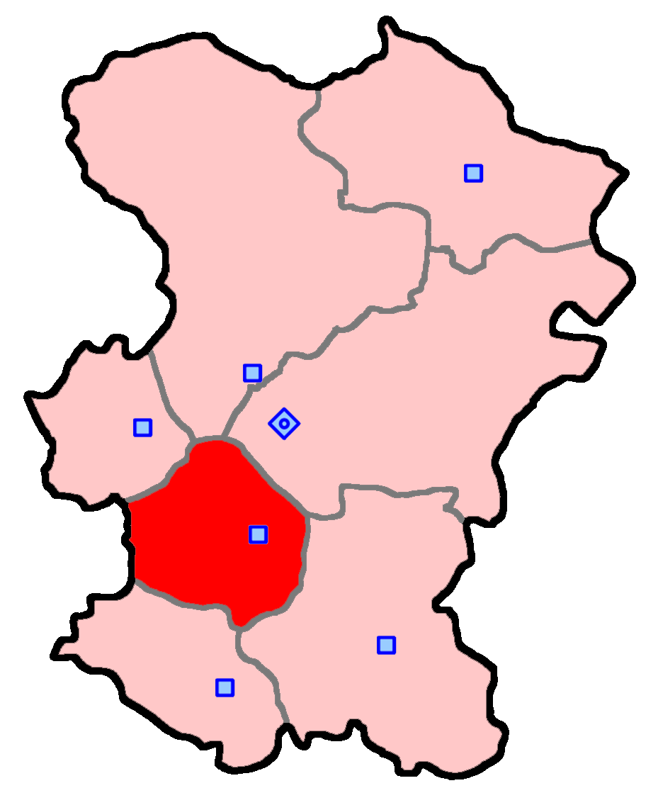 حوزهٔ انتخاباتی تویسرکان برای انتخابات مجلس شورای اسلامی